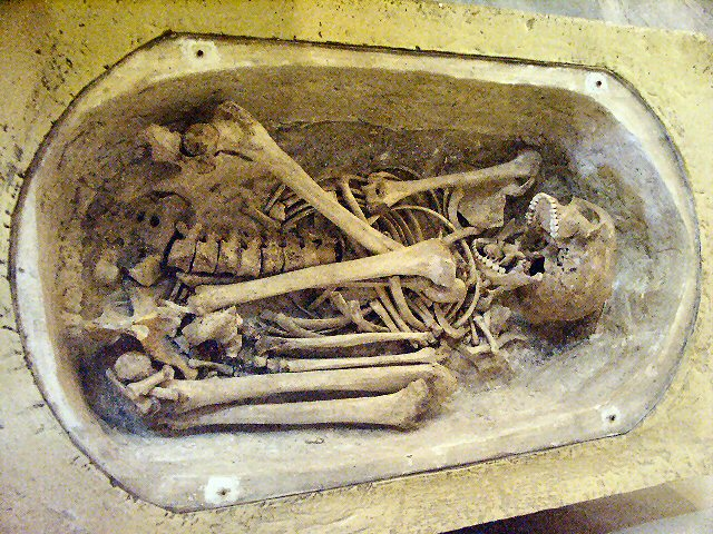 Geöffneter kretominoischer Sarkophag aus Kreta (Archäologisches Museum, Iraklio, Kreta)